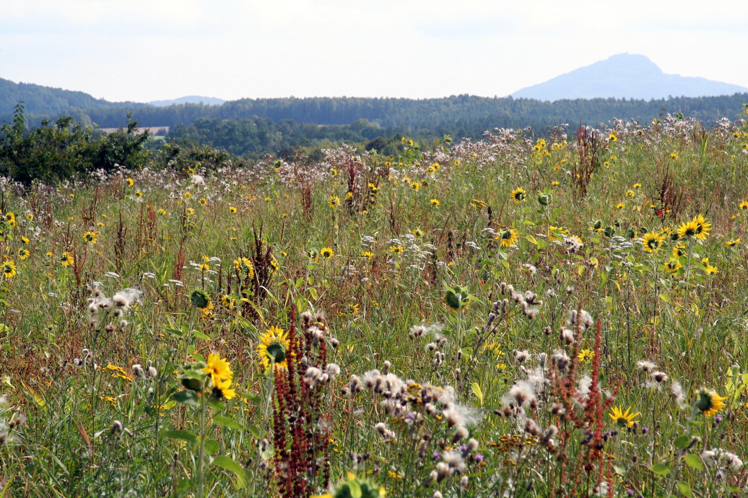 Sommerwiese am Slabitschken, Tölzberg im Hintergrund